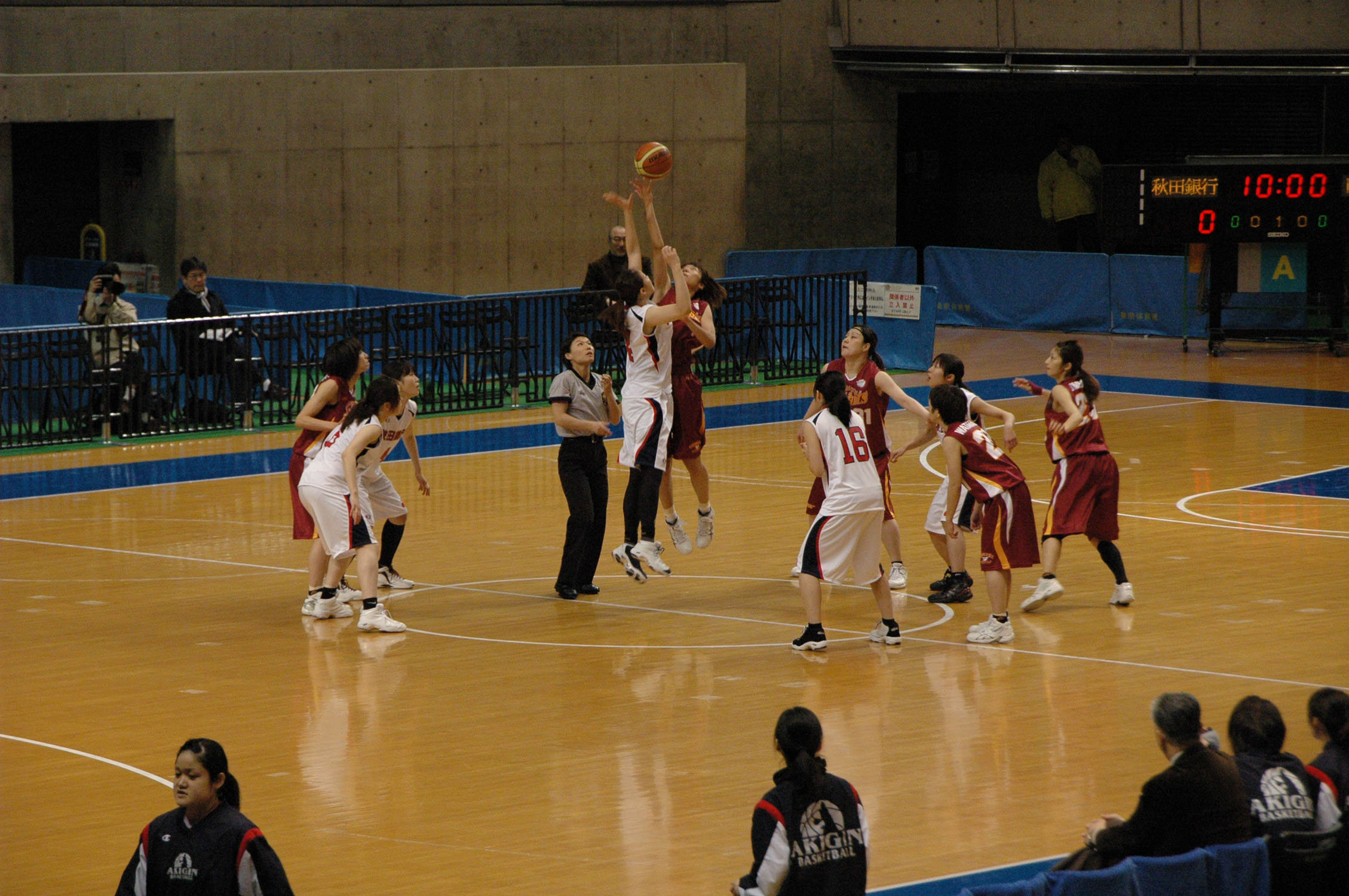 2011年全日本総合バスケットボール選手権大会2回戦、秋田銀行対トヨタ紡織サンシャインラビッツ。東京体育館で。